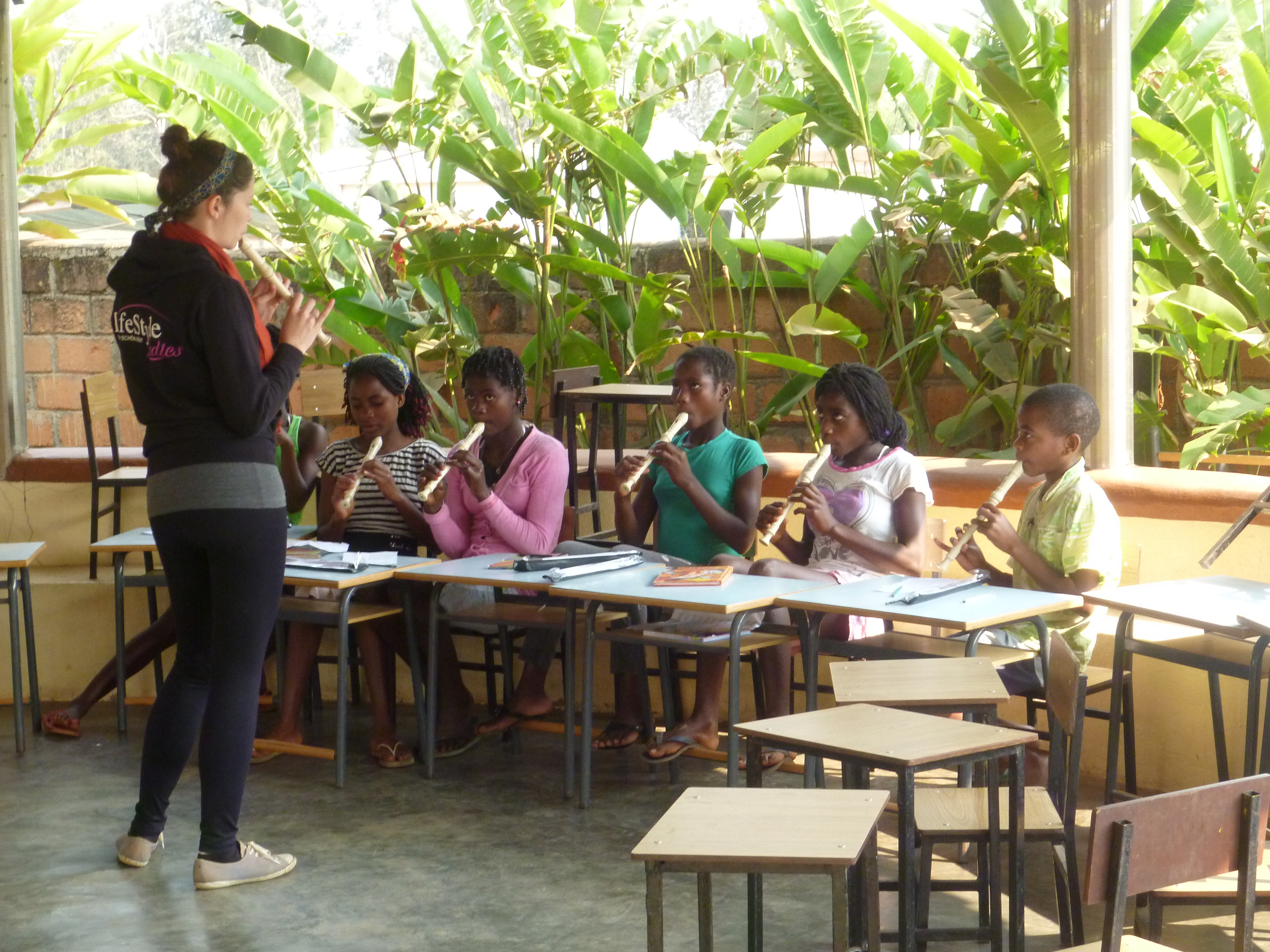 Prostovoljstvo v Angoli